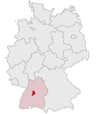 Landkreis Böblingen, Baden-Württemberg, Germany